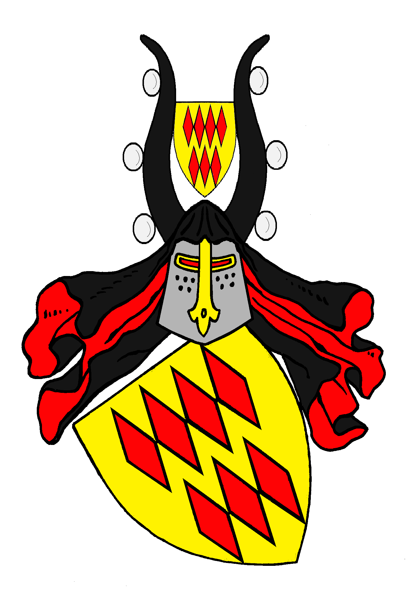 Stammwappen der Grafen von Virneburg, ein Adelsgeschlecht, das im Mittelalter zu den einflussreichen Familien im Rheinland gehörte. Sie hatten ihren Stammsitz auf Burg Virneburg. Ihr Territorium war die Grafschaft Virneburg, die im heutigen linksrheinischen nördlichen Rheinland-Pfalz lag. Mit Heinrich II. von Köln und Heinrich III. von Mainz stellten die Virneburger im 14. Jahrhundert zwei Erzbischöfe. Der Vater des ersten Grafen von Virneburg, Hermann, war wahrscheinlich Bernard von Virneburg, der von 1042 bis 1061 in Urkunden der Erzbischöfe von Trier als Zeuge aufgeführt wurde. Das Geschlecht der Grafen von Virneburg erlosch mit Ruprecht IV. im Jahre 1445 und wurde hauptsächlich von den Grafen von Manderscheid beerbt, von welchen die Grafschaft Virneburg zu Ende des 16. Jahrhunderts durch Heirat an die Fürsten von Löwenstein-Wertheim kam.